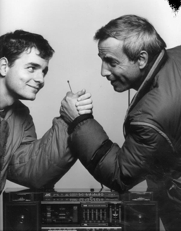 מיצג של חמיצר אב ובנו בהתמודדות בין דורית